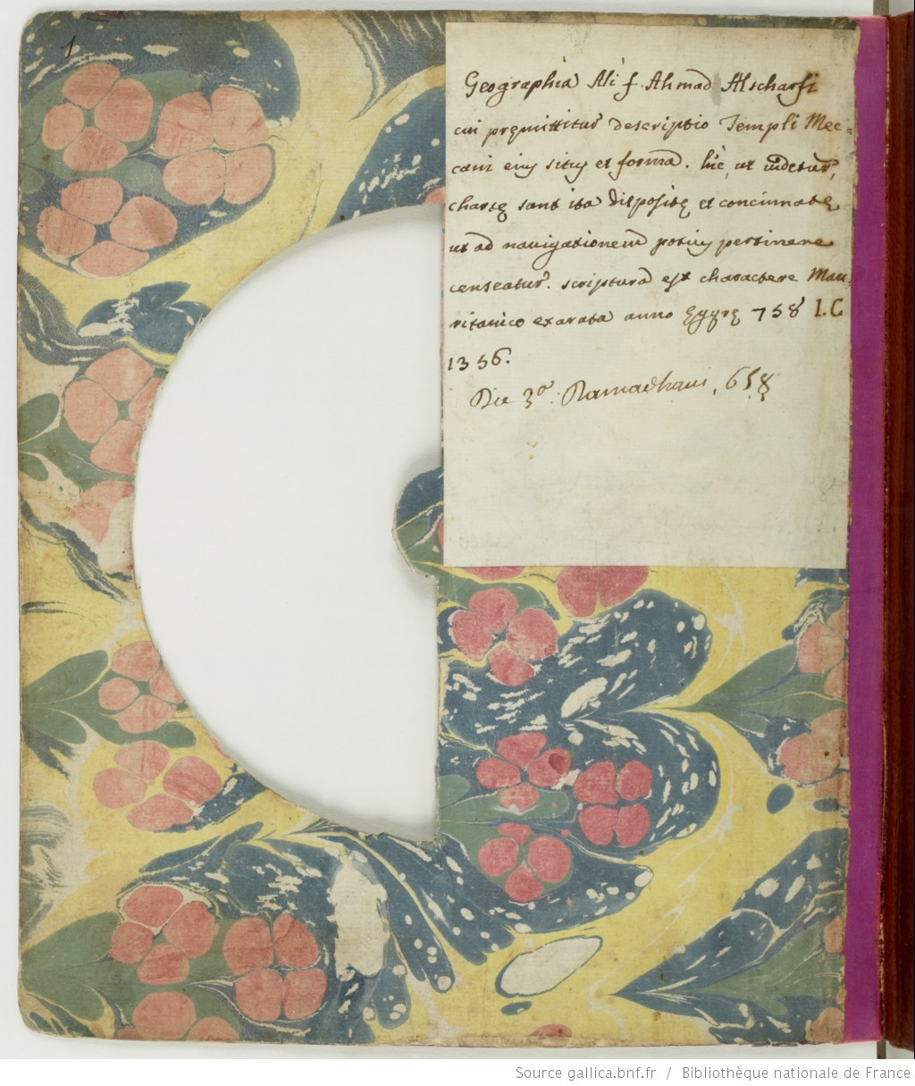 كتاب الطبلة